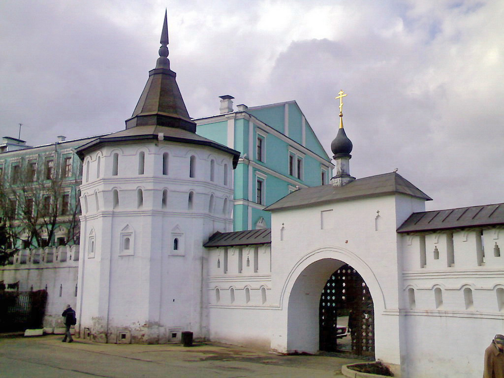 Данилов монастырь.